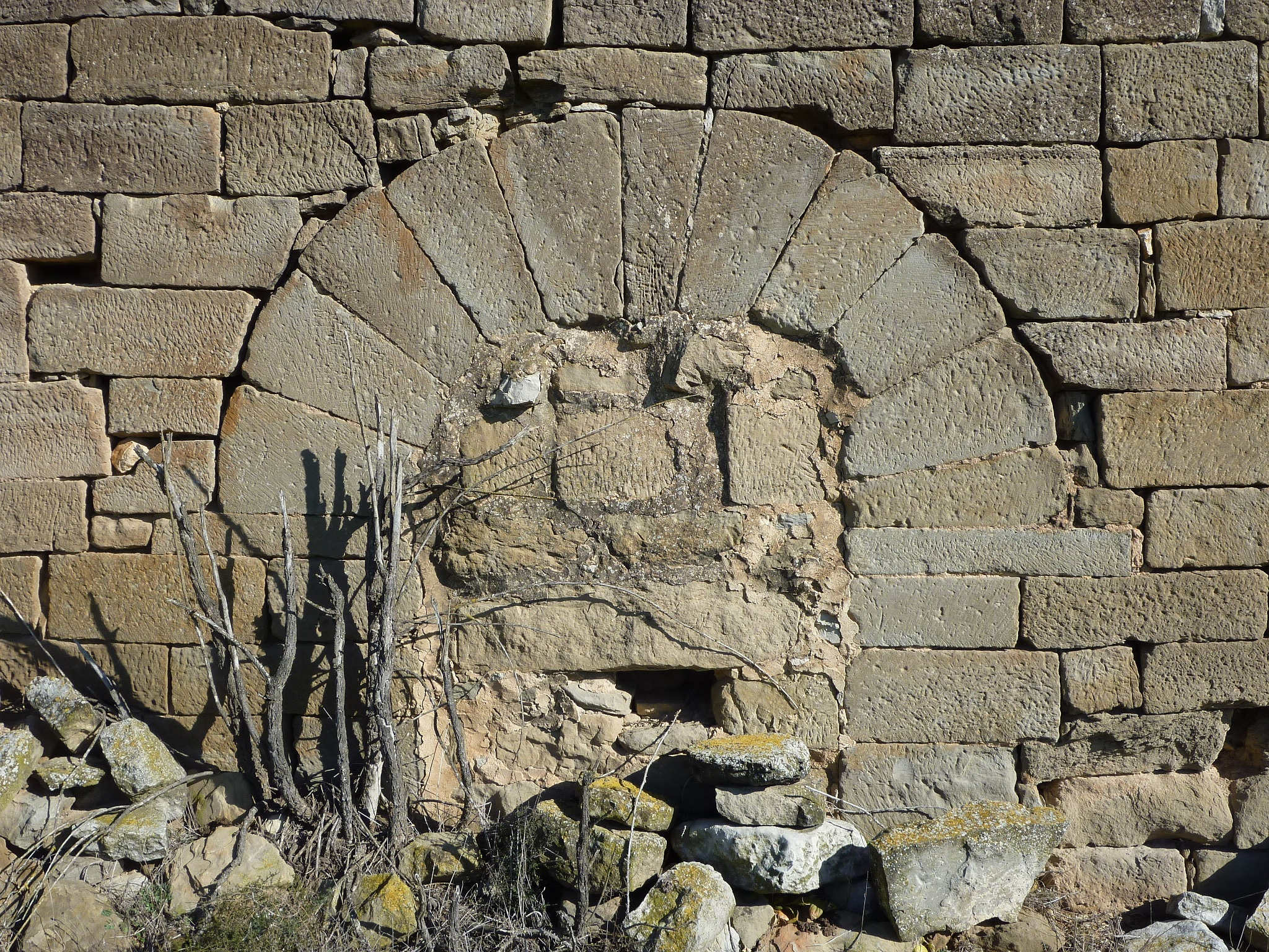 Antic Priorat de Tauladells (Torrefeta i Florejacs): portal a la façana de ponent